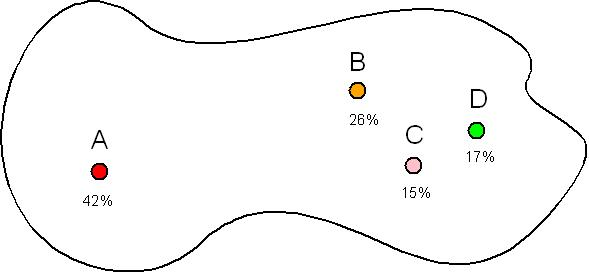 מפה לדוגמה עבור הצבעת אישור - מבוססת על דוגמת טנסי מן הוויקיפדיה האנגלית בערך המקביל.